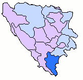 BosniaRegion Trebinje